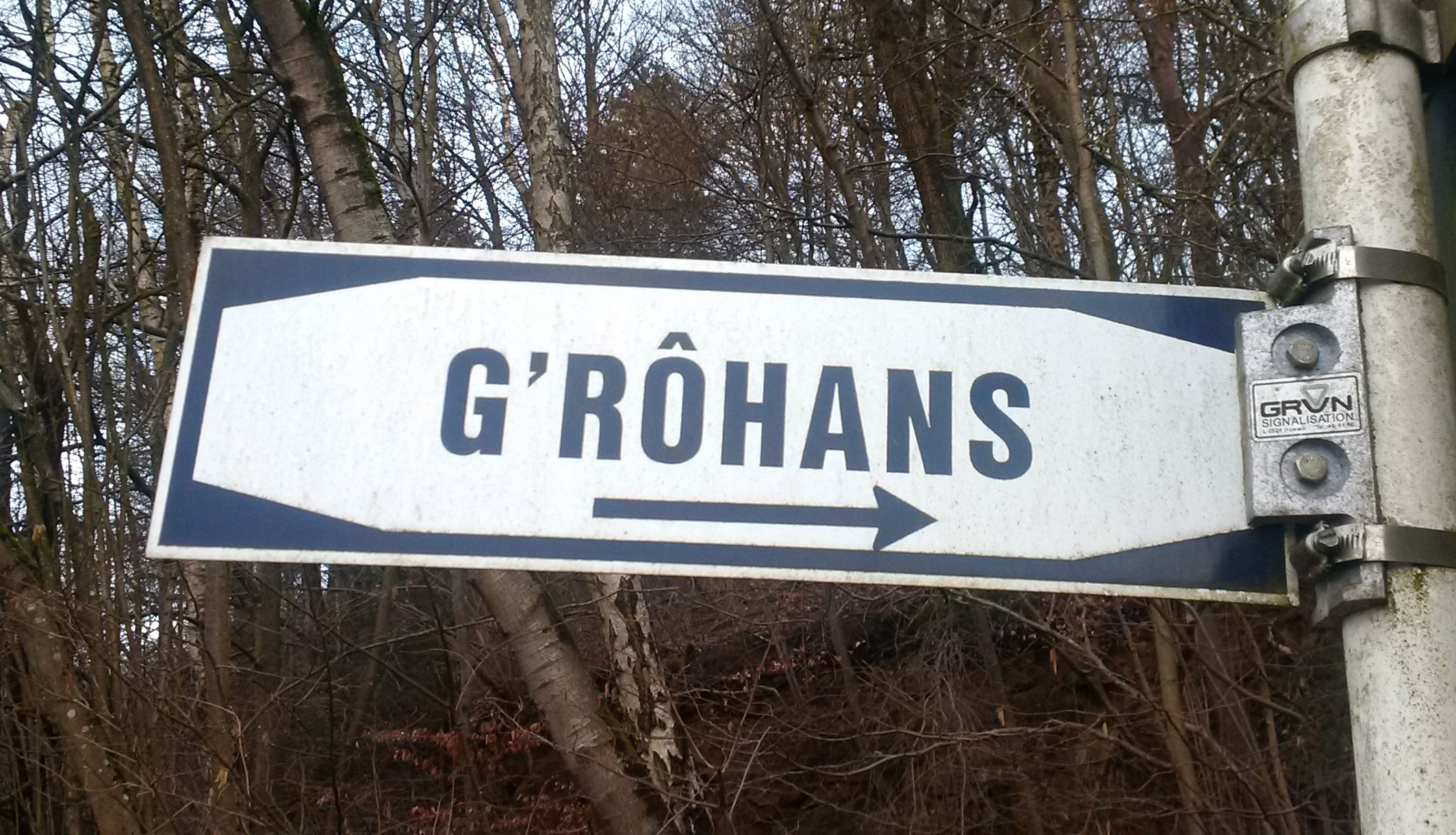 Plaque de lieu-dit à Neudorf, Luxembourg